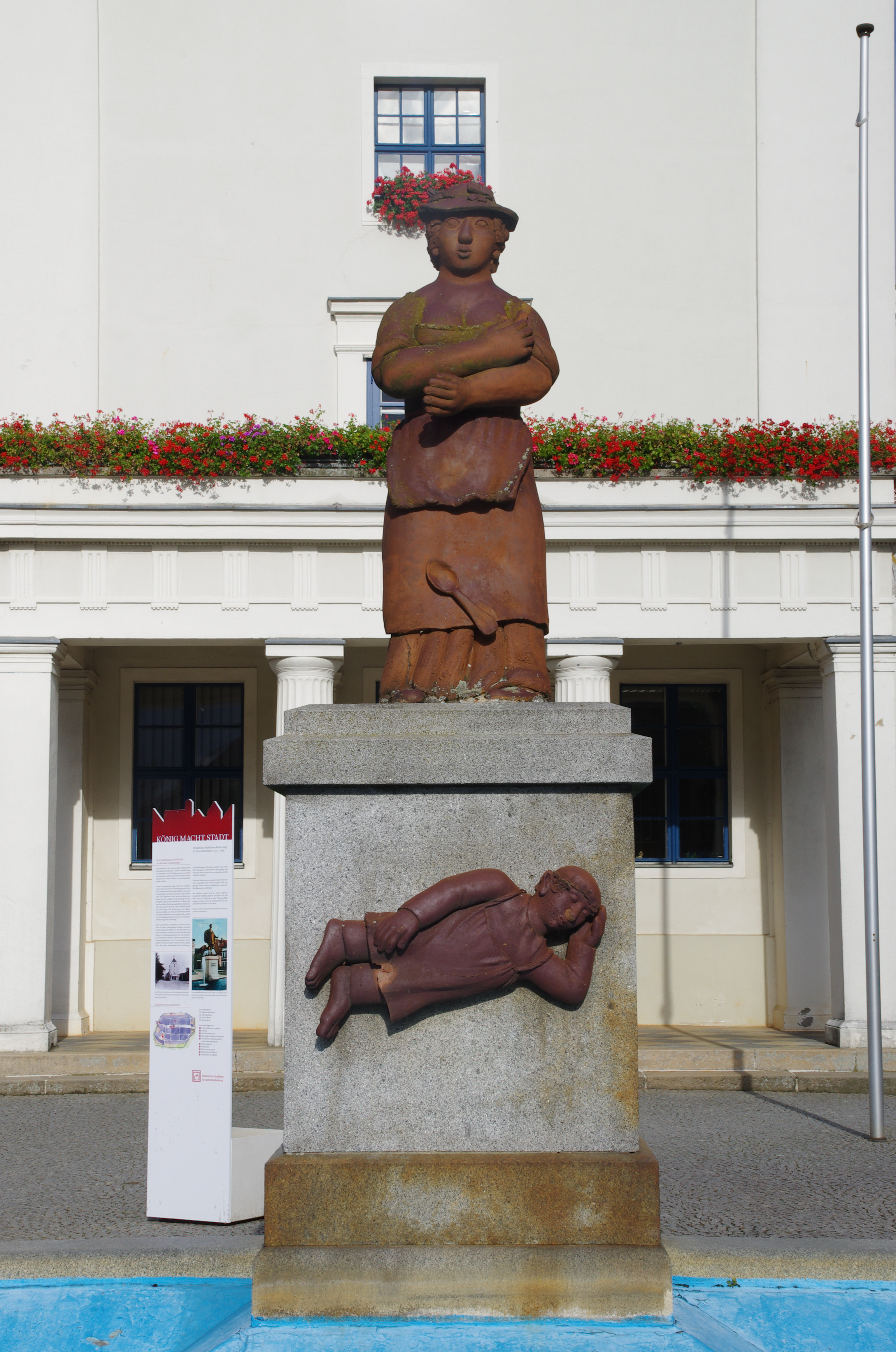 Treuenbrietzen in Brandenburg. Der Sabinchenbrunnen befindet sich an der Großstraße südlich des Rathauses. Der Brunnen steht unter Denkmalschutz.